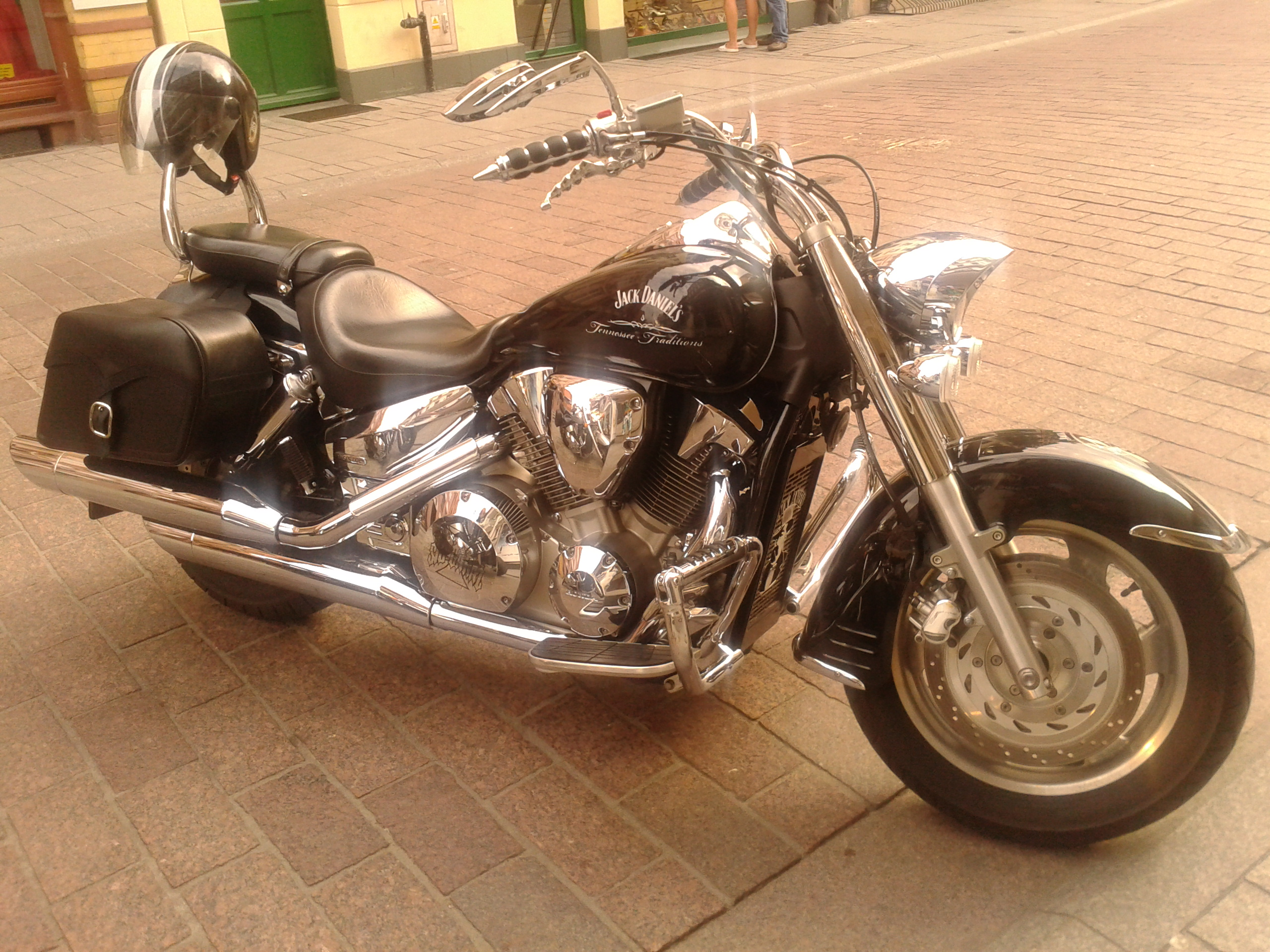 Honda VTX